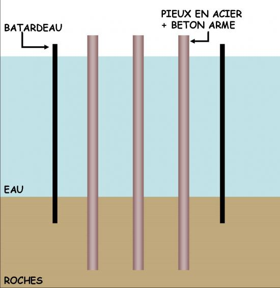 coupe d'une fondation avec pieux